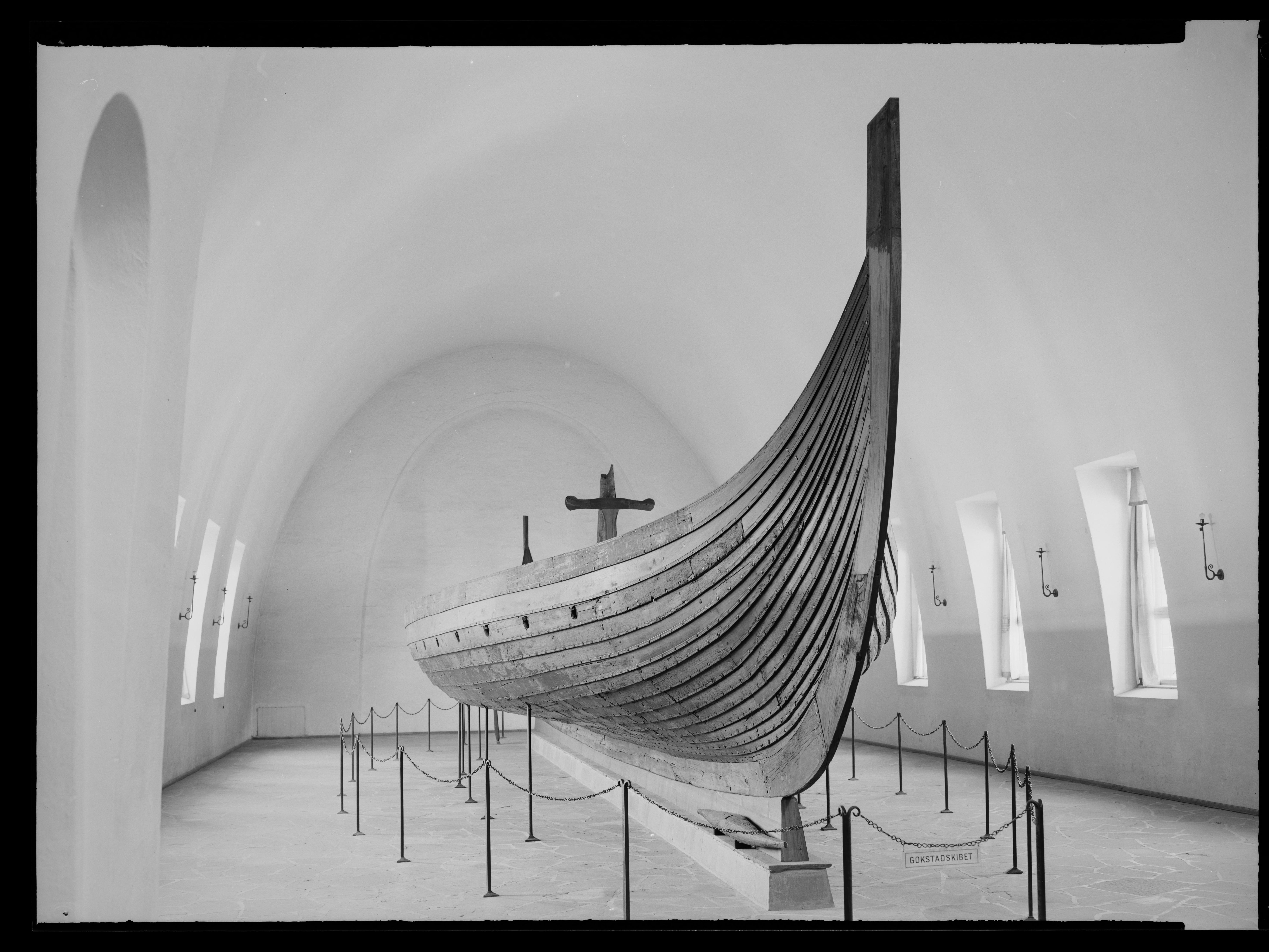 Bildet er hentet fra Nasjonalbibliotekets bildesamling Bygdøy,Oslo, Oslo, Oslo